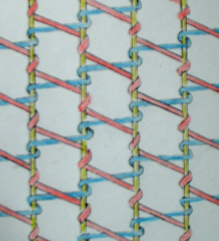 Bobinetstruktur